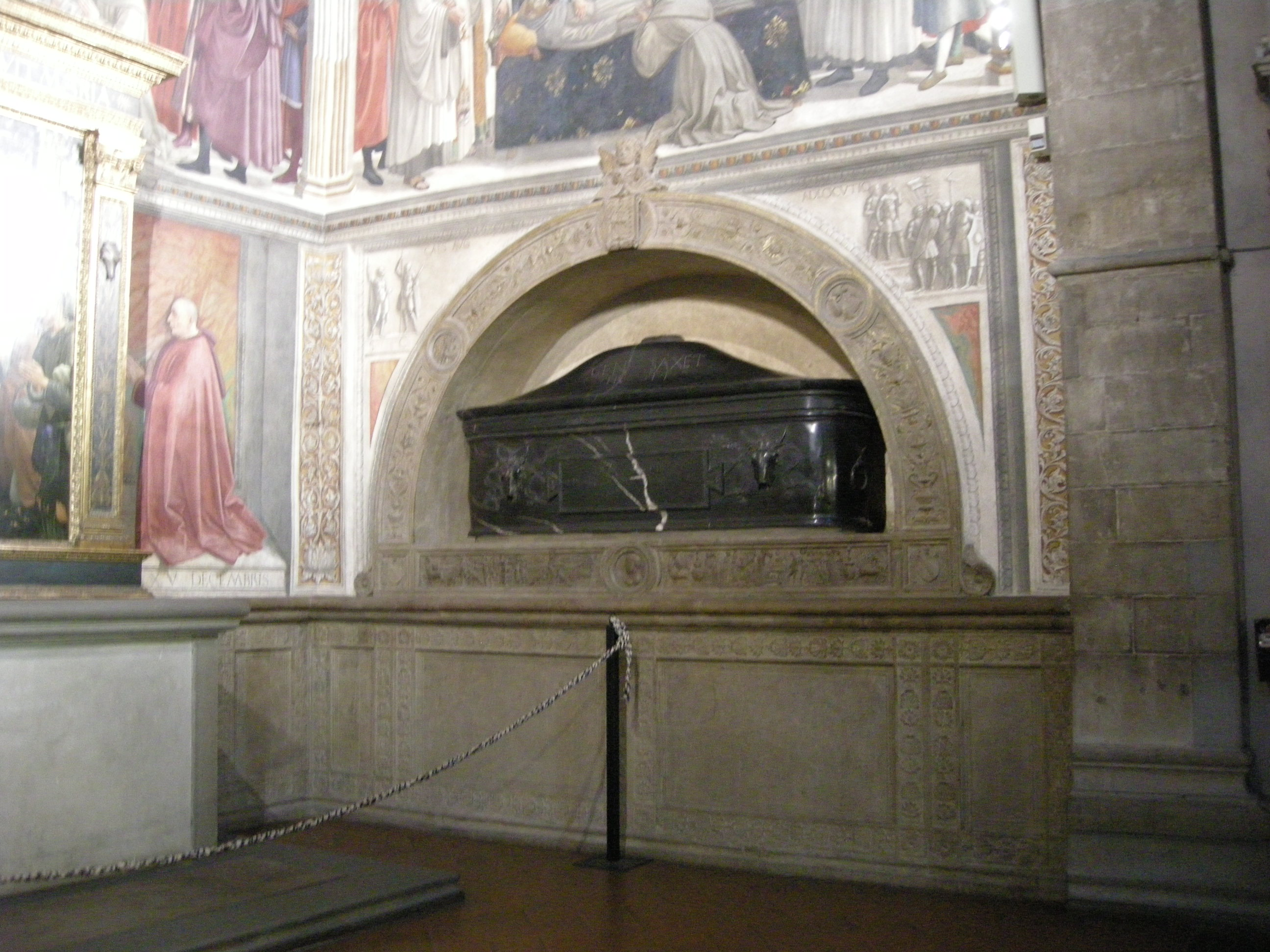 Santa trinita, cappella sassetti, giuliano da sangallo, sepolcro